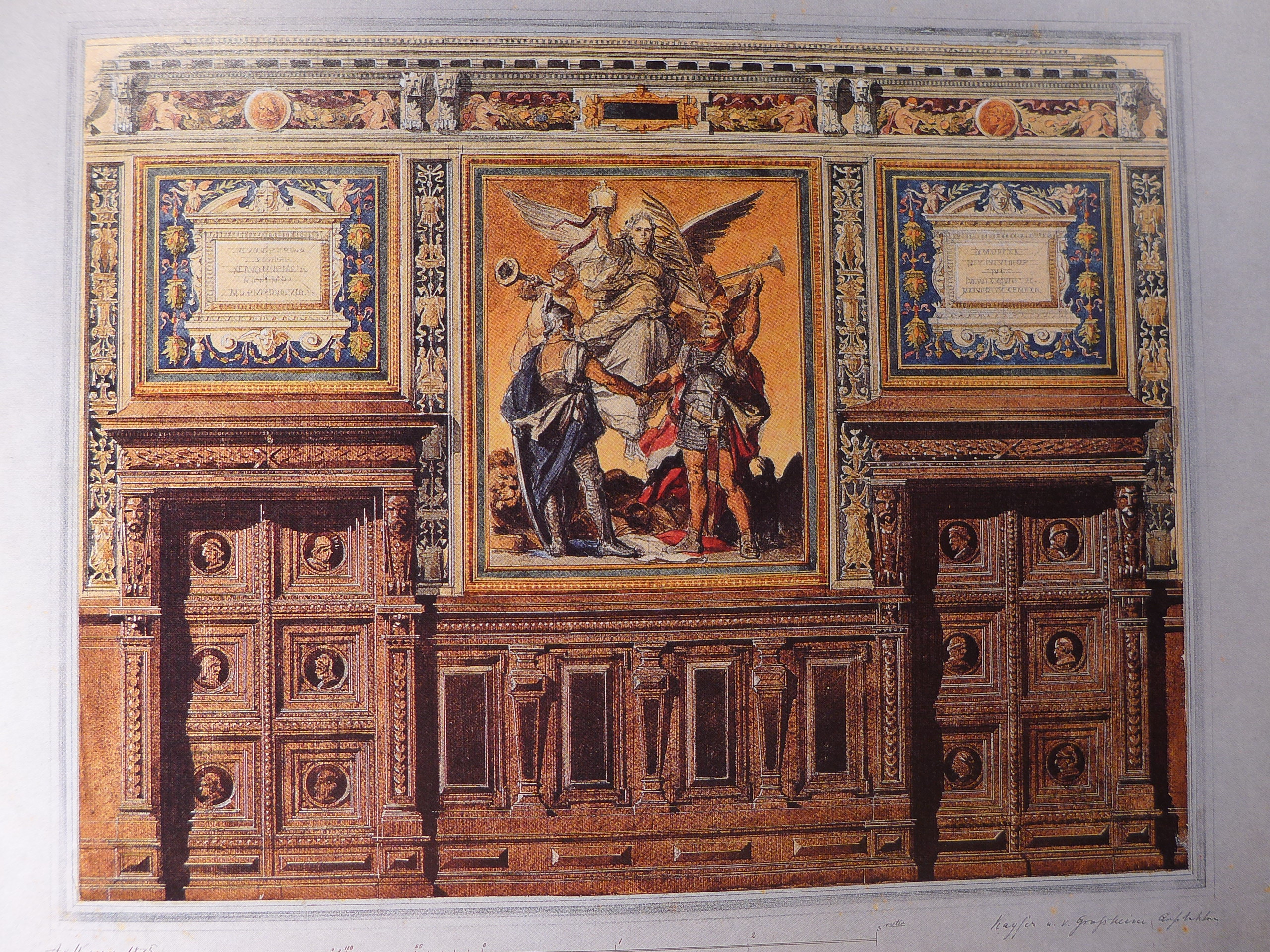 Altes Rathaus (Saarbrücken); Anton von Werner: Entwurf zur Wanddekoration im Rathausfestsaal; im Zentrum der Vorentwurf für das Gemälde "Victoria", 1875, Aquarell auf Pappe augezogen, 362 x 470 mm, (Merseburg, Geheimes Staatsarchiv Preußischer Kulturbesitz , Rep. 92, Nachlass Anton von Werner, Zeichnungen, Mappe 10, Blatt 20)